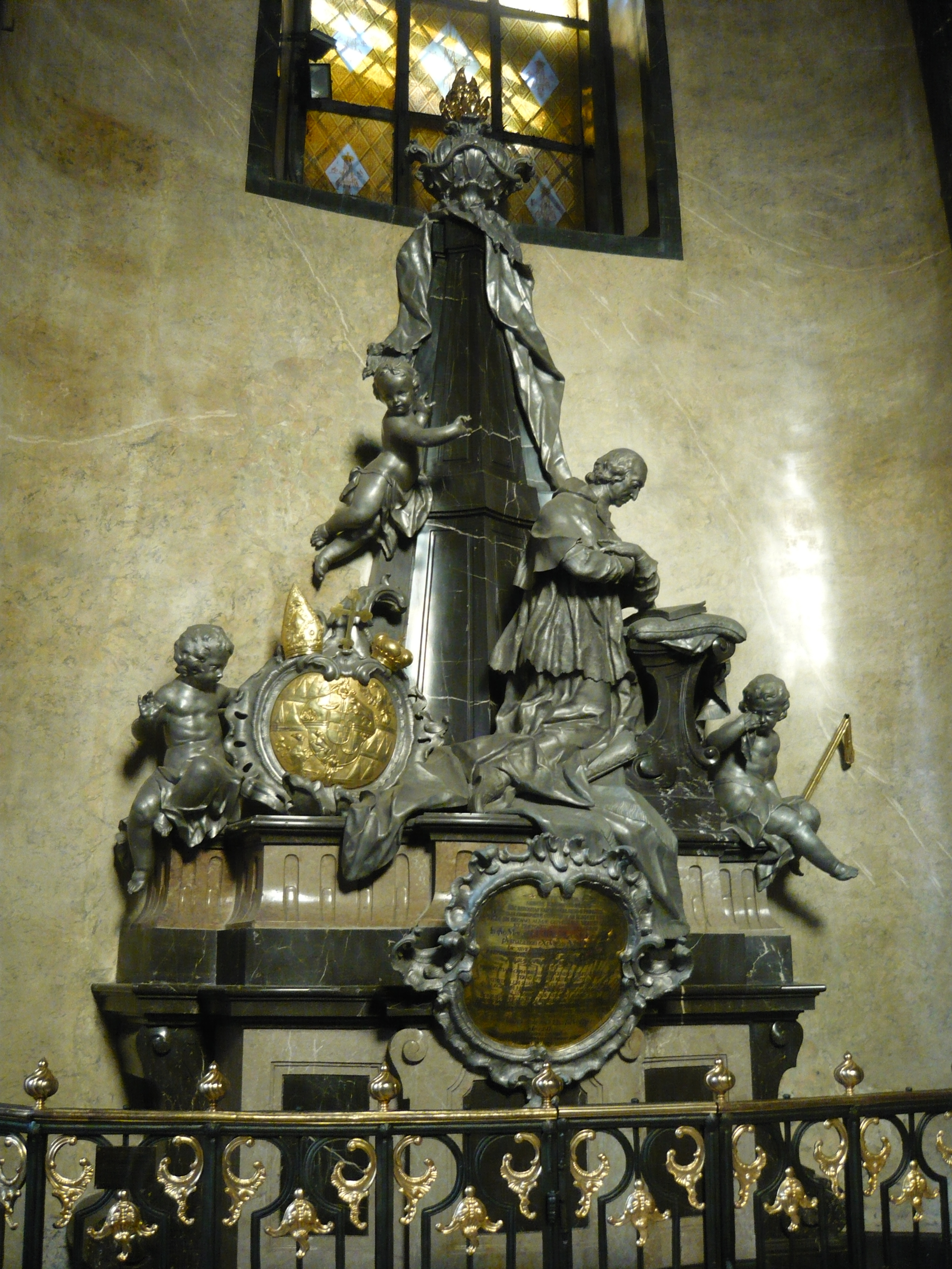 Náhrobek olomouckého biskupa Leopolda Bedřicha Egkha v kapli bolestné Panny Marie v kostele sv. Mořice v Kroměříži. Náhrobek zhotovil sochař František Hirnle (1726 - 1773), dokončeno roku 1764